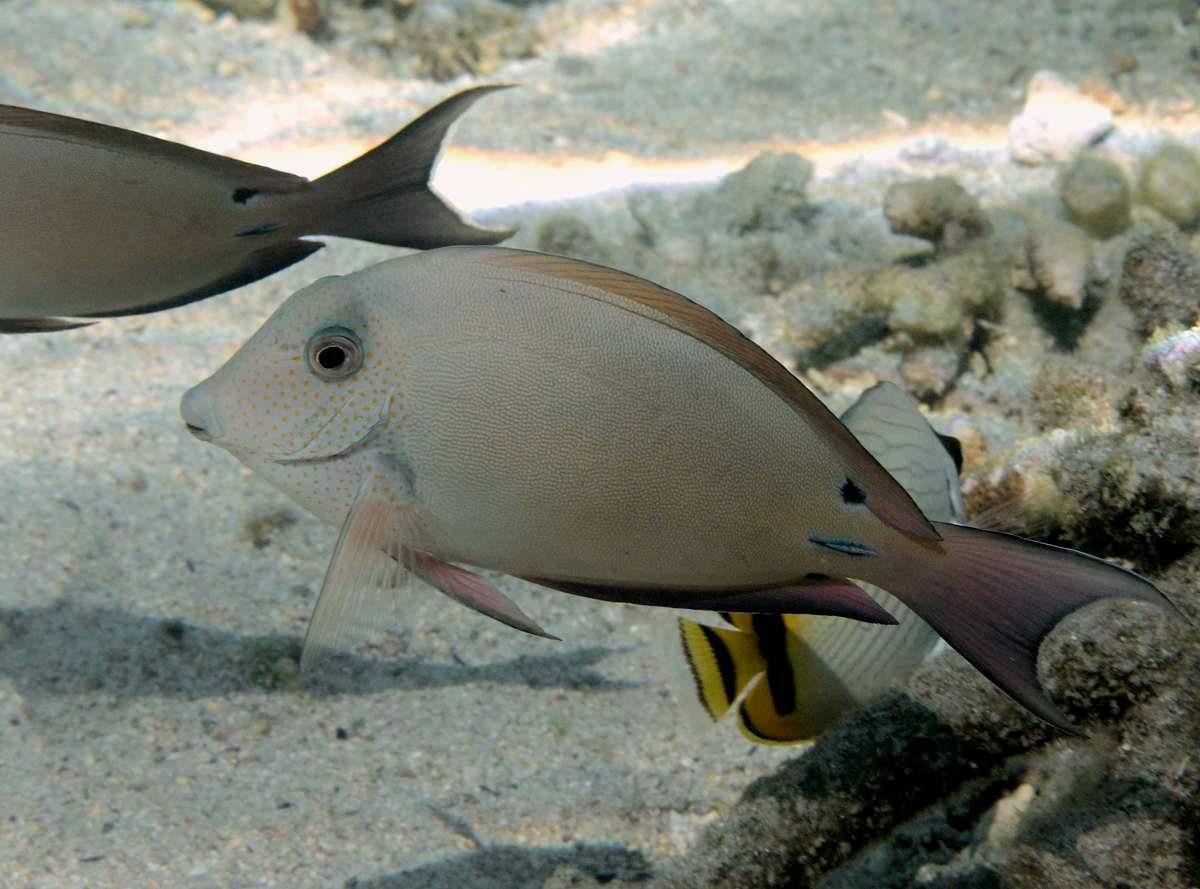 Un chirurgien brun (Acanthurus nigrofuscus) juvénile à la Réunion.